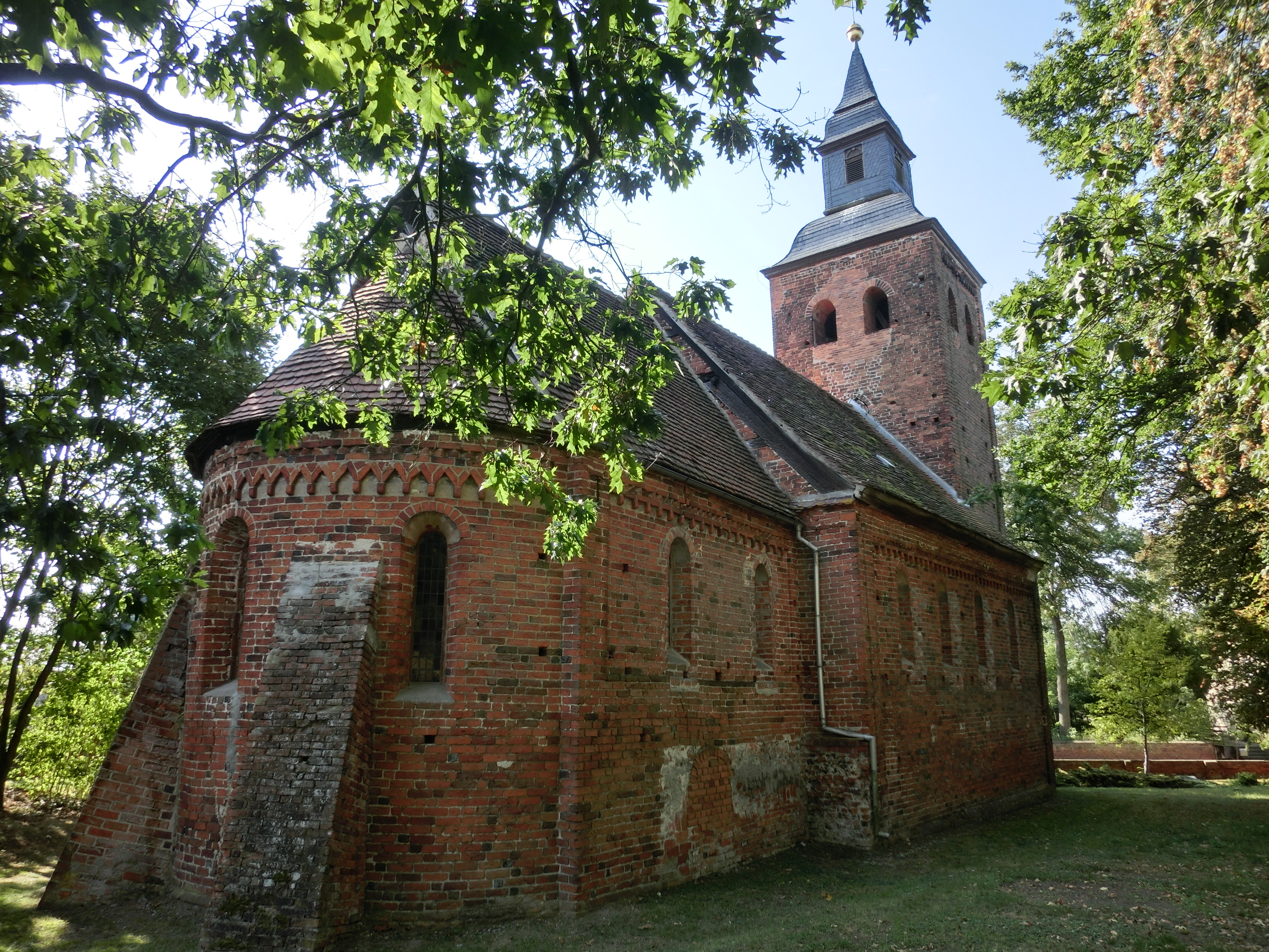 Baudenkmal, Erfassungsnummer 091 50401